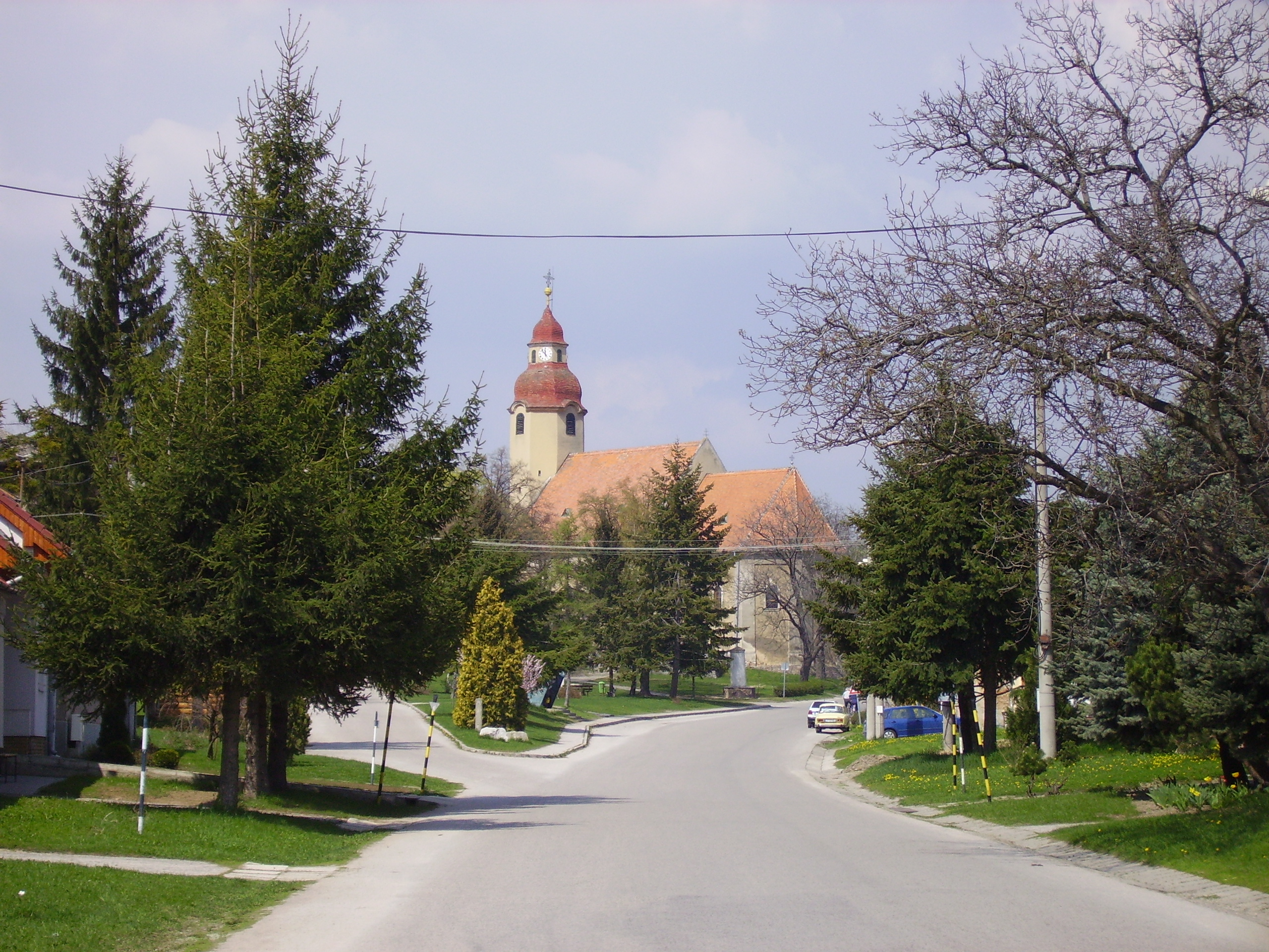 Description: Suchá nad Parnou, Slovakia Author: Radovan Bahna, 2006